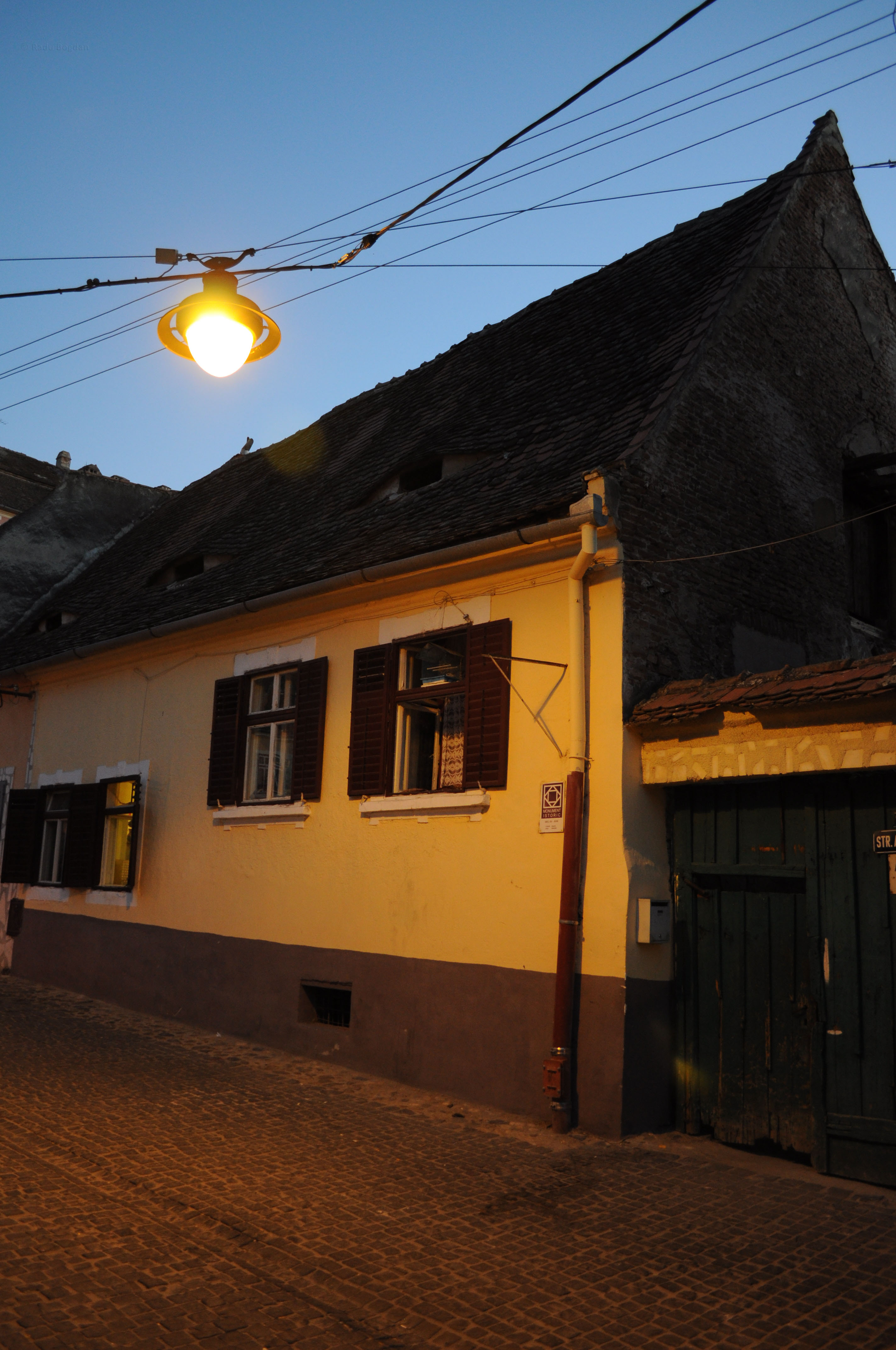 Casa - vedere laterala, Str. Argintarilor 1